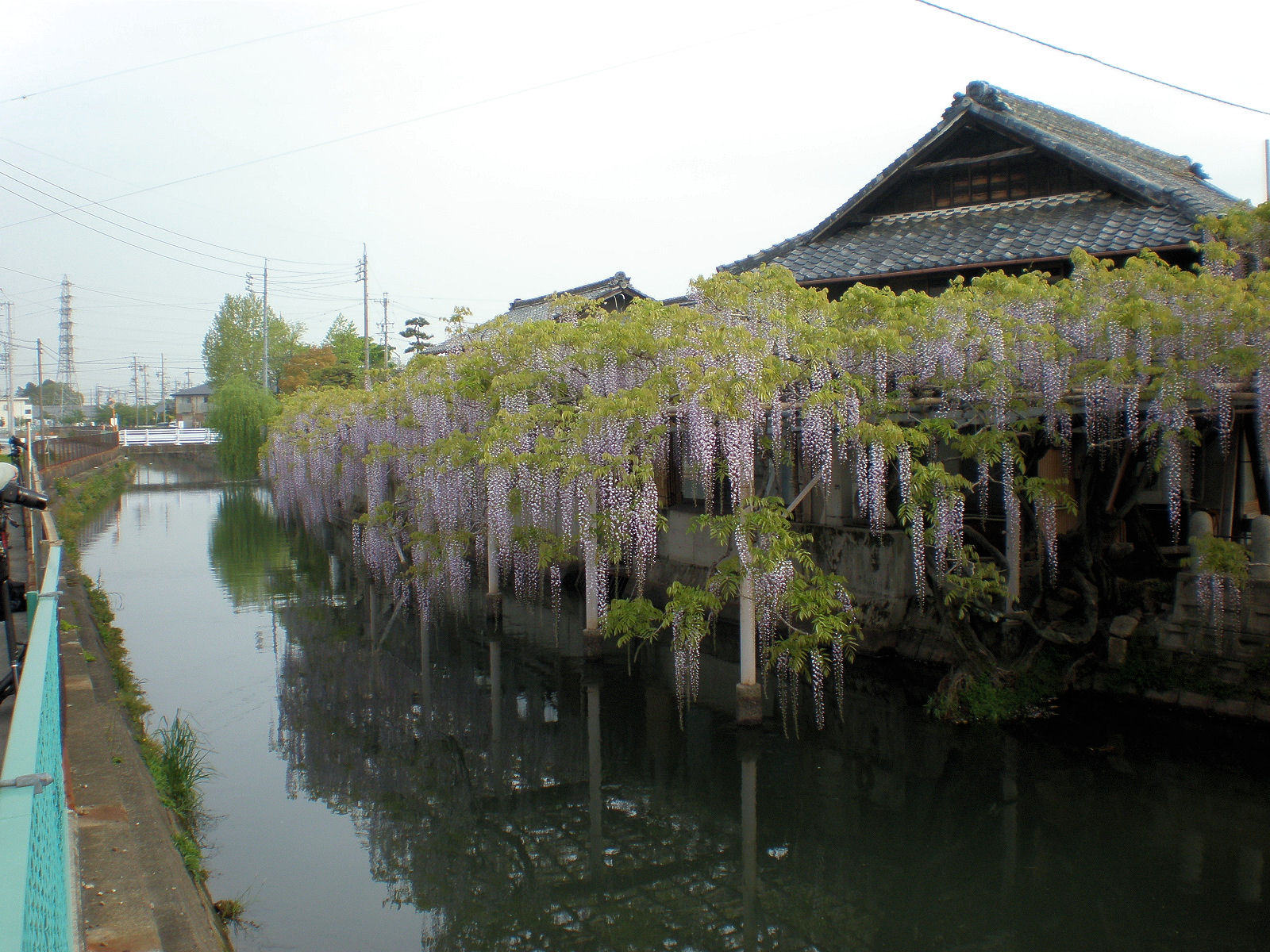 愛知県小牧市にある料亭「清流亭」